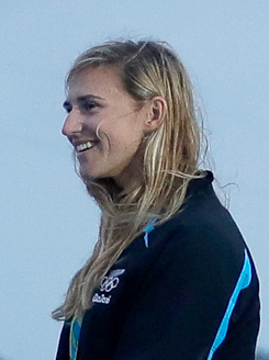 Rio de Janeiro - As brasileiras Martine Grael e Kahena Kunze conquistaram o ouro na classe 49er FX da vela dos Jogos Olímpicos Rio 2016, na regata final na Baía de Guanabara (Fernando Frazão/Agência Brasil)